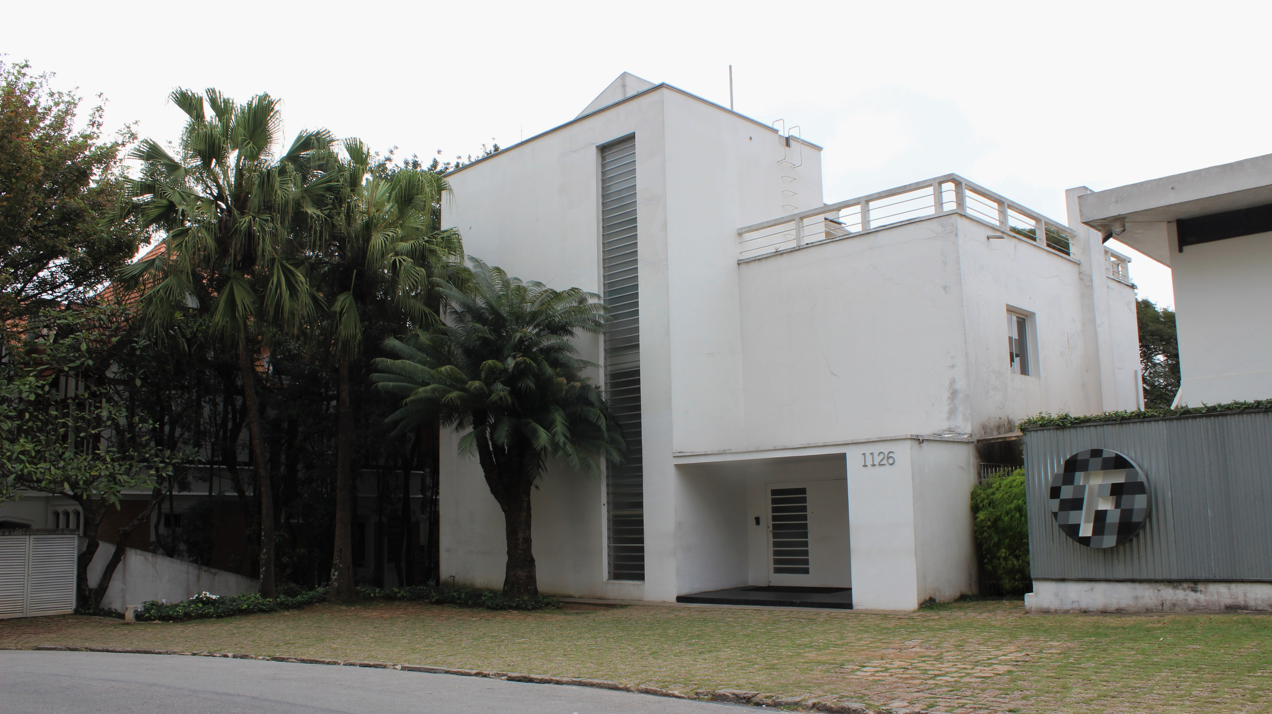 Face lateral da Casa Modernista da Rua Bahia, em que se pode ver a diferença entre os dois blocos principais, além de suas aberturas frontais e laterais. Projeto de de Gregori Warchavchik, em São Paulo (SP, Brasil).